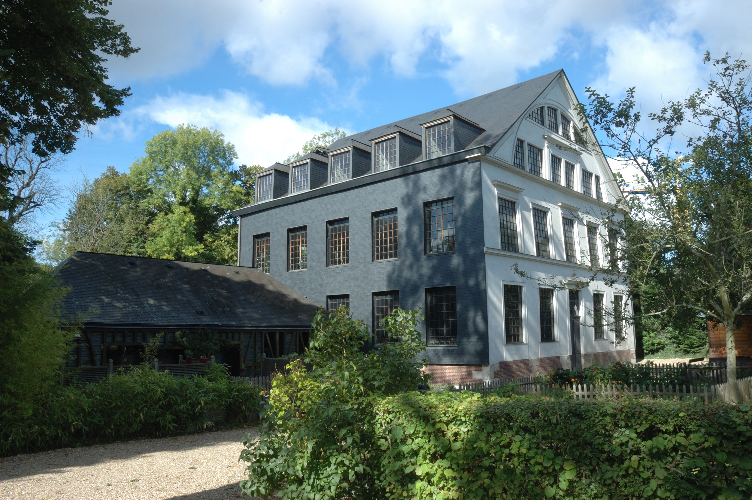 Filature de coton, puis corderie Vallois, actuellement Musée industriel de la corderie Vallois à Notre-Dame-de-Bondeville .